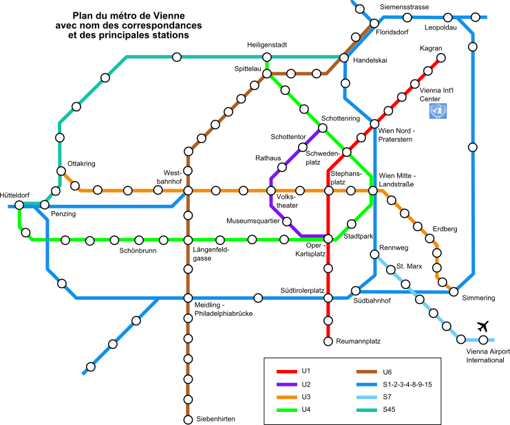 Description: Vienne, coeur du réseau de métro et des trains de banlieue, avec nom des correspondances Date: 2006-01 Licence: réalisé par Witoki sous licence suivante